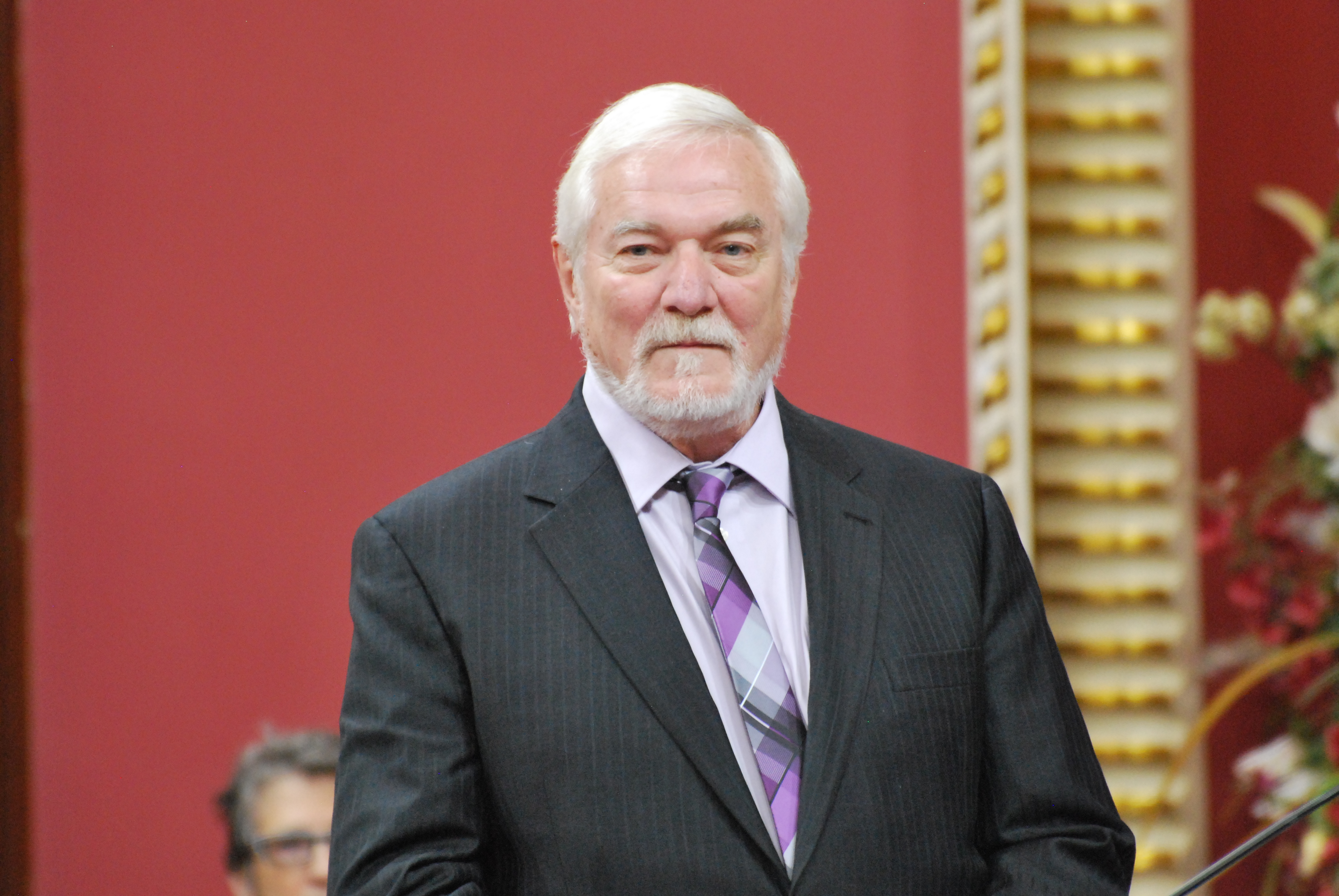 Cérémonie de remise de l'ordre national du Québec 2013. Michel Dumont.